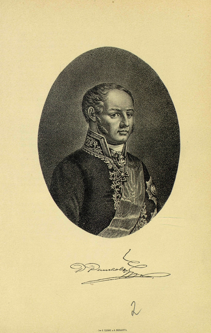 Портрет Д. В. Дашкова